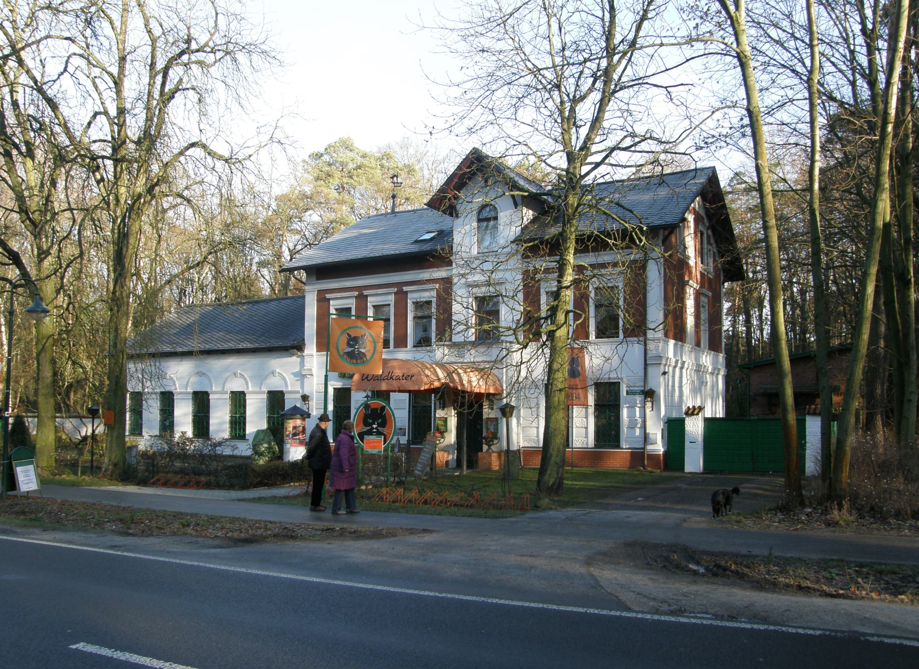 Bernau bei Berlin, Stadtteil Waldfrieden: Restaurant Waldkater